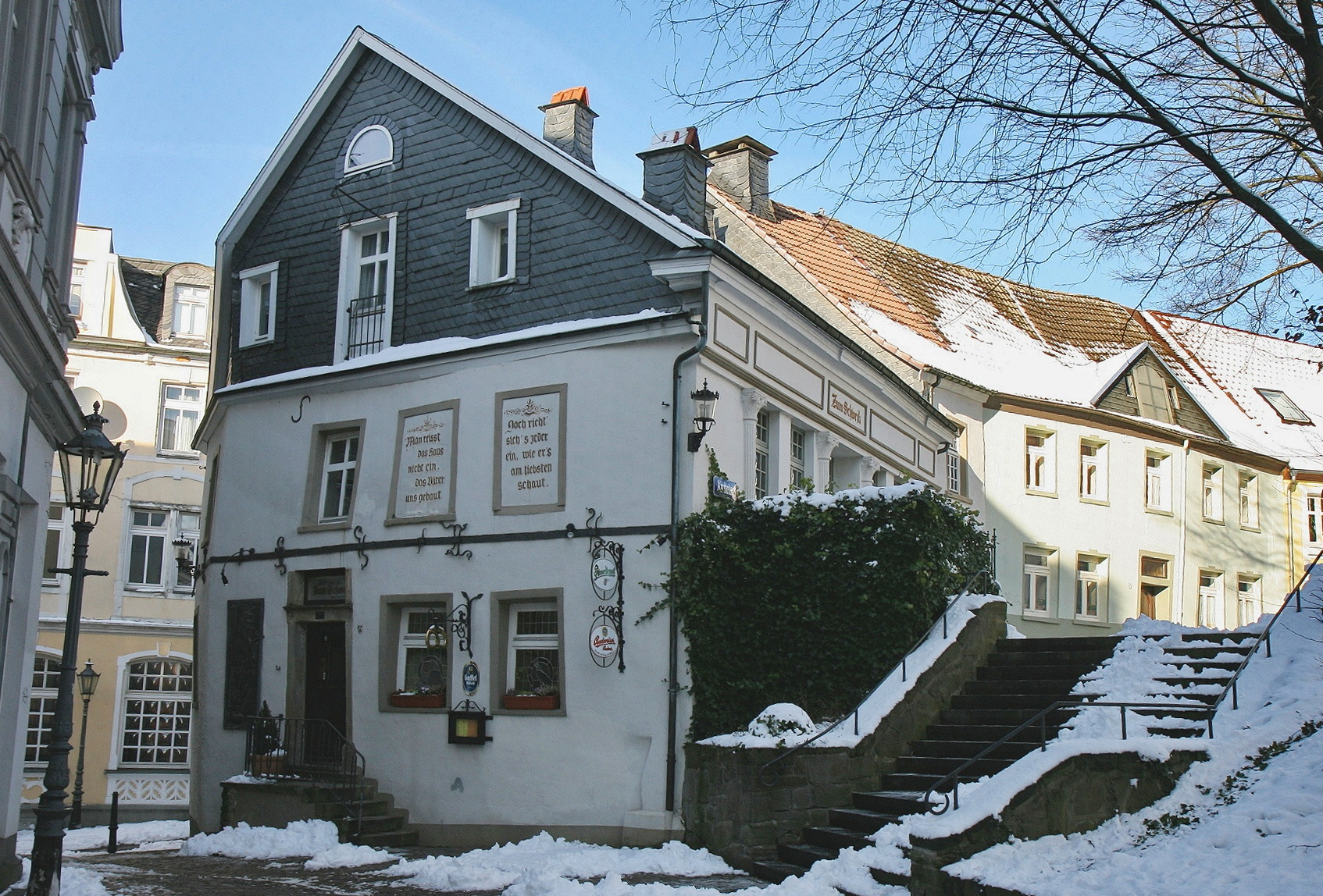 Denkmalgeschütztes Haus (heute Gasthof „Zum Schwejk“) in Lüdenscheid, Kirchplatz 1.